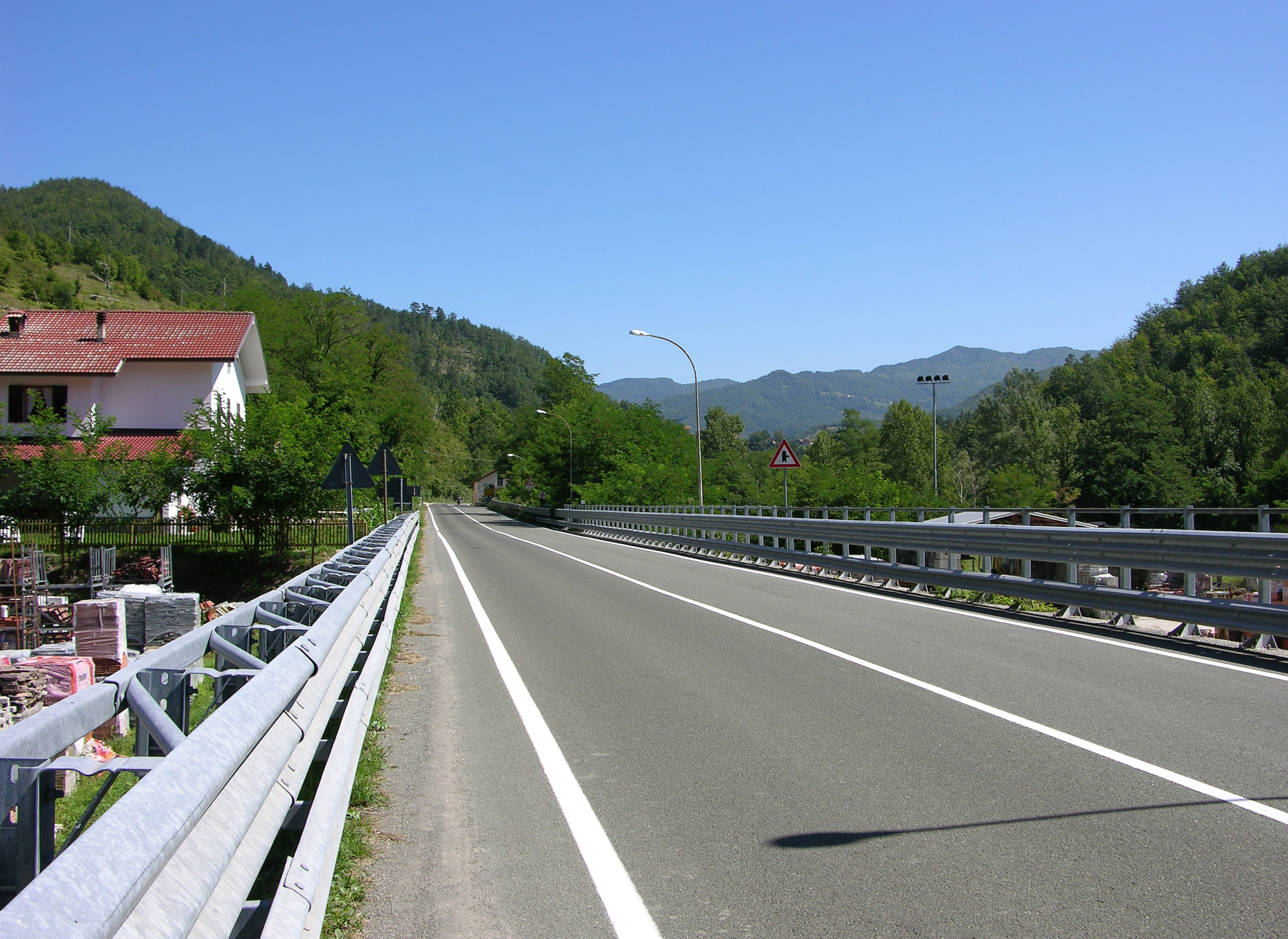 SS 45 presso Gorreto (GE) - direzione nord verso Piacenza.